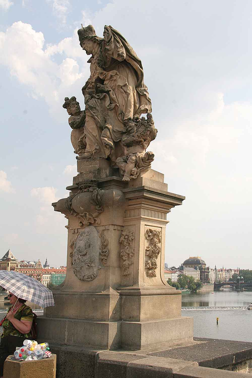 Česky: Sousoší Svaté Ludmily s malým Svatým Václavem na Karlově mostě